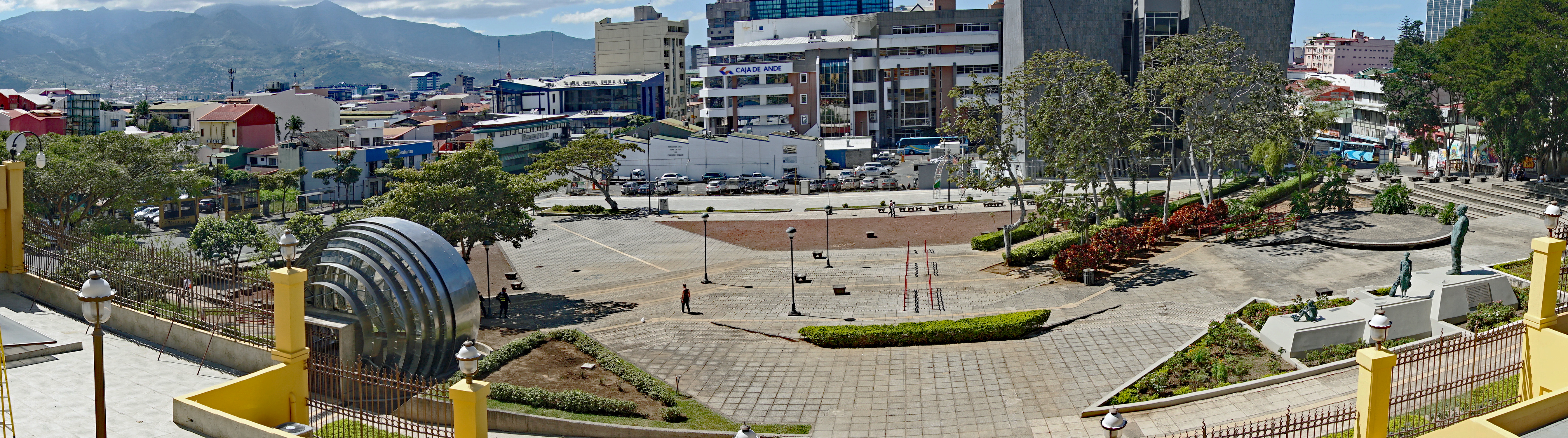 Vista Panorámica de la Plaza de la Democracia, San José, Costa Rica